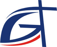 Das Logo des Verbandes der Gemeinschaften in der Evangelischen Kirche in Schleswig-Holstein